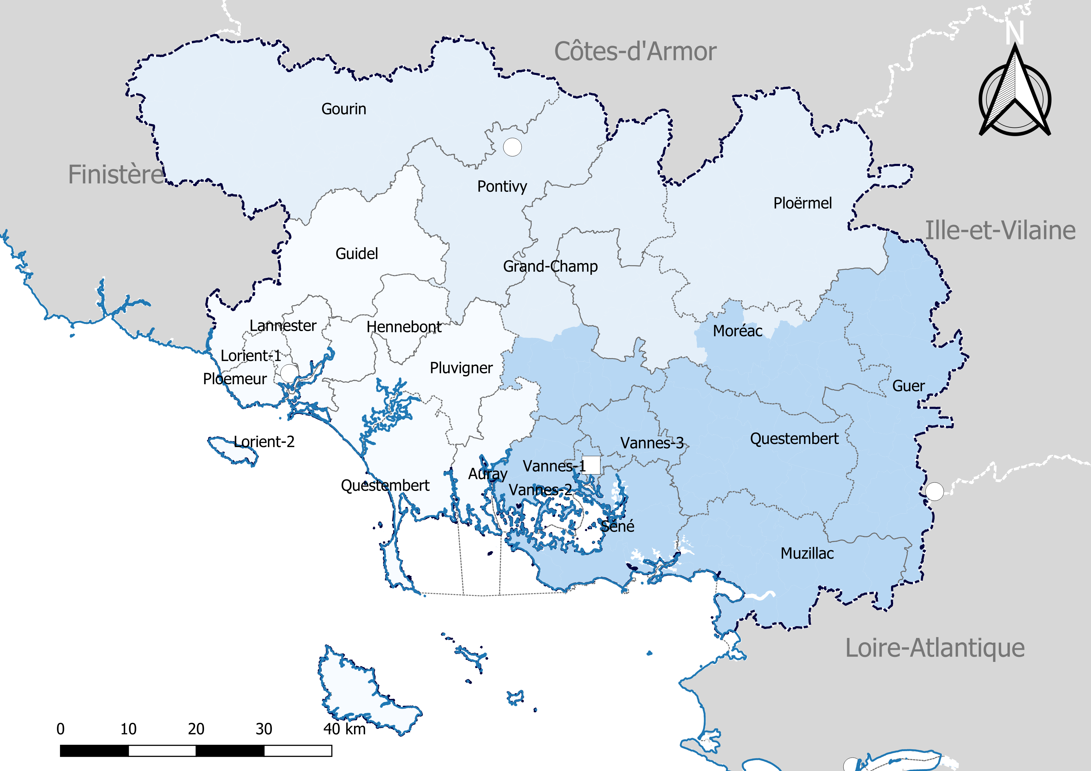 Carte du découpage cantonal du département du Morbihan, avec en surimpression les arrondissements (en nuances de bleu) - Carte arrêtée au 1er janvier 2019.